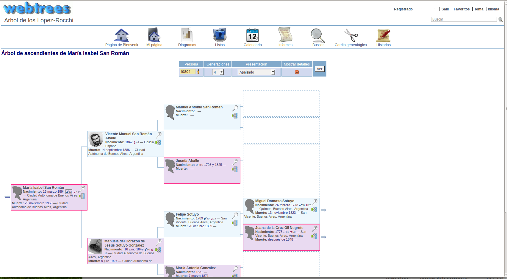 Captura de pantalla de la aplicación webtrees en la versión 1.5.3